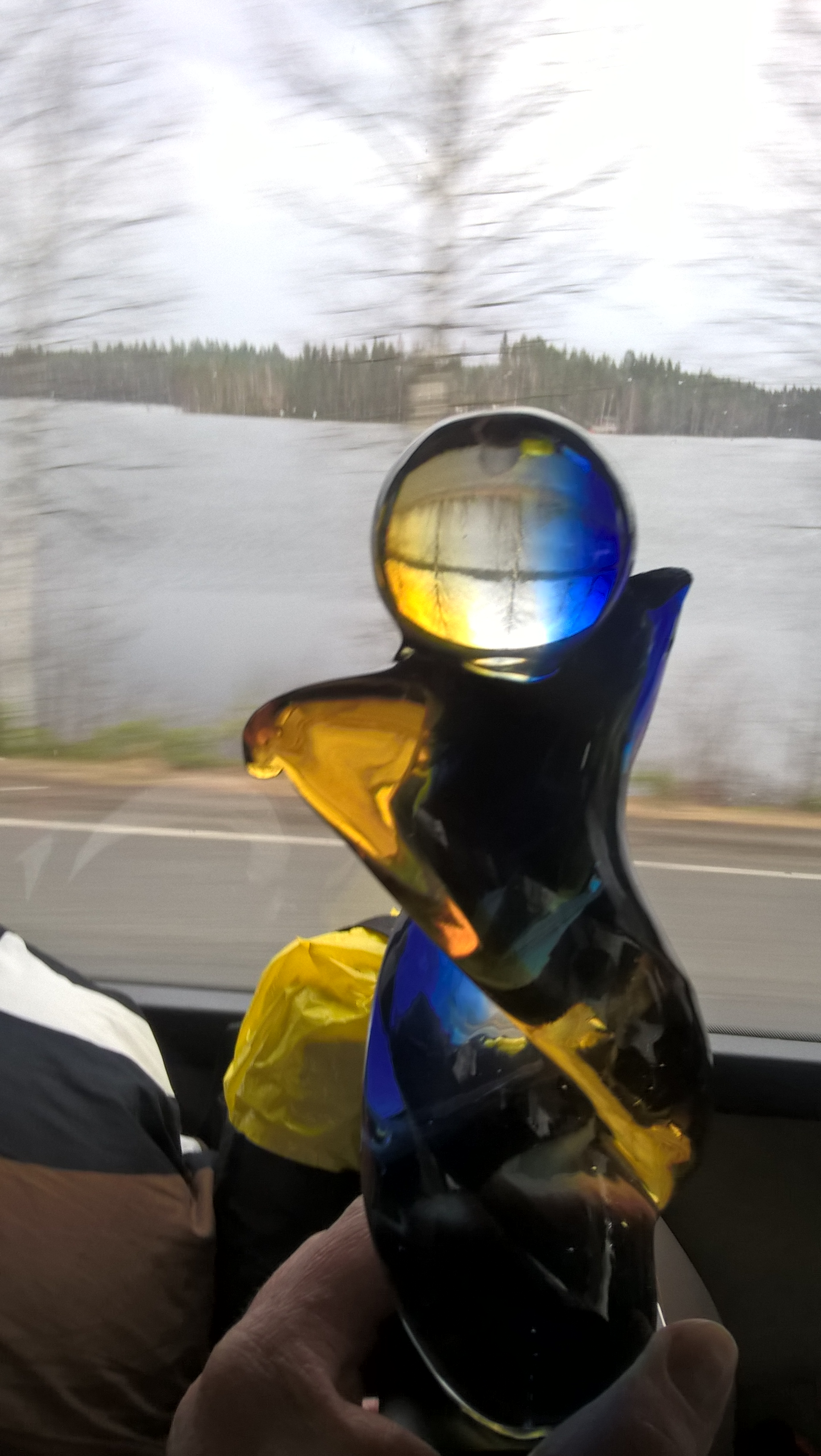 Ylioppilasteatterifestivaalin palkintona toimiva lasiveistos